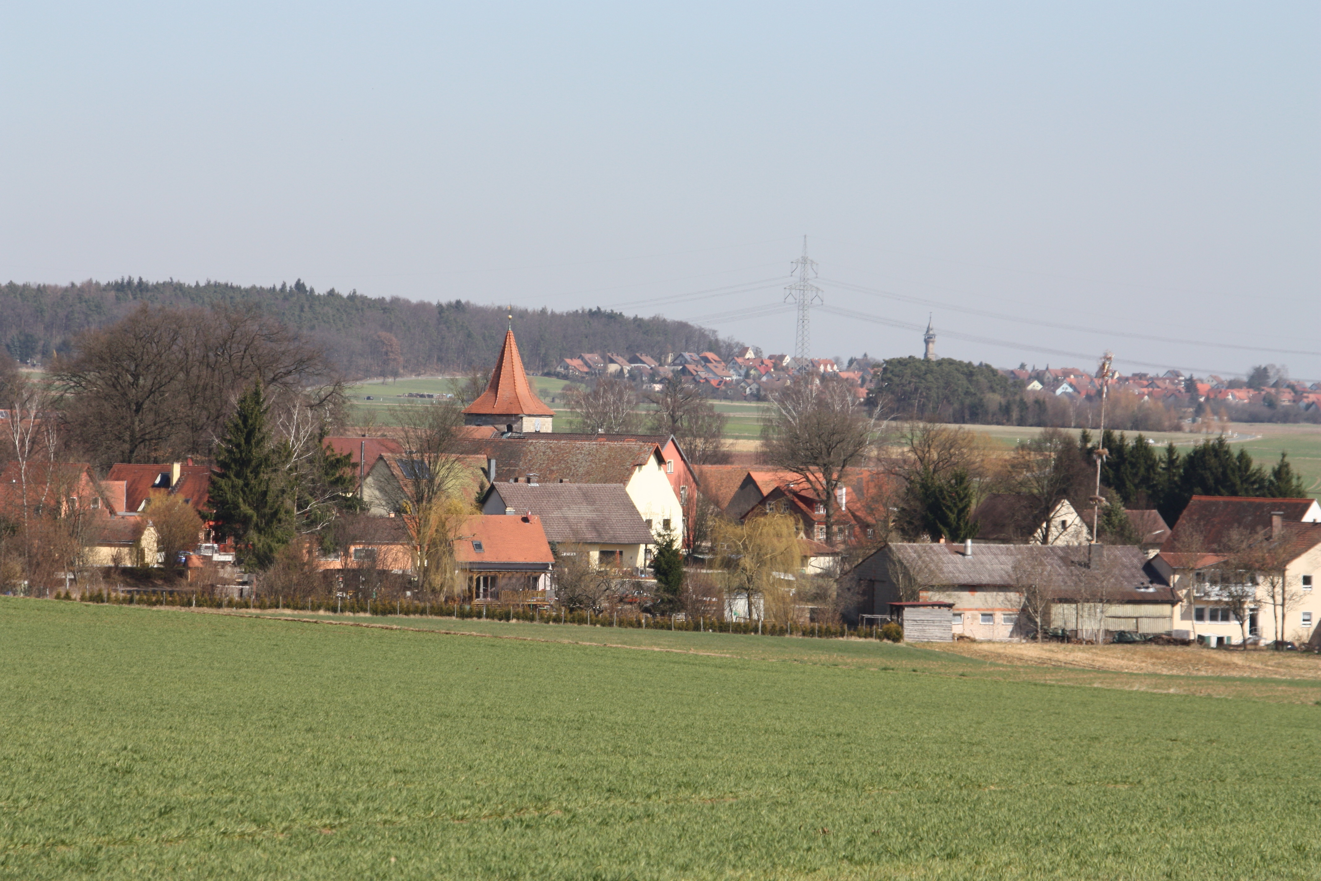 Cadolzburg OT Zautendorf